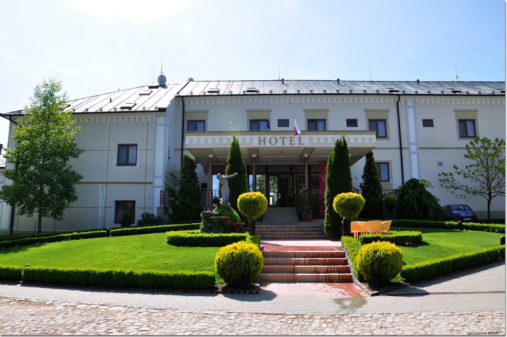 Park Hotel Tartuf****